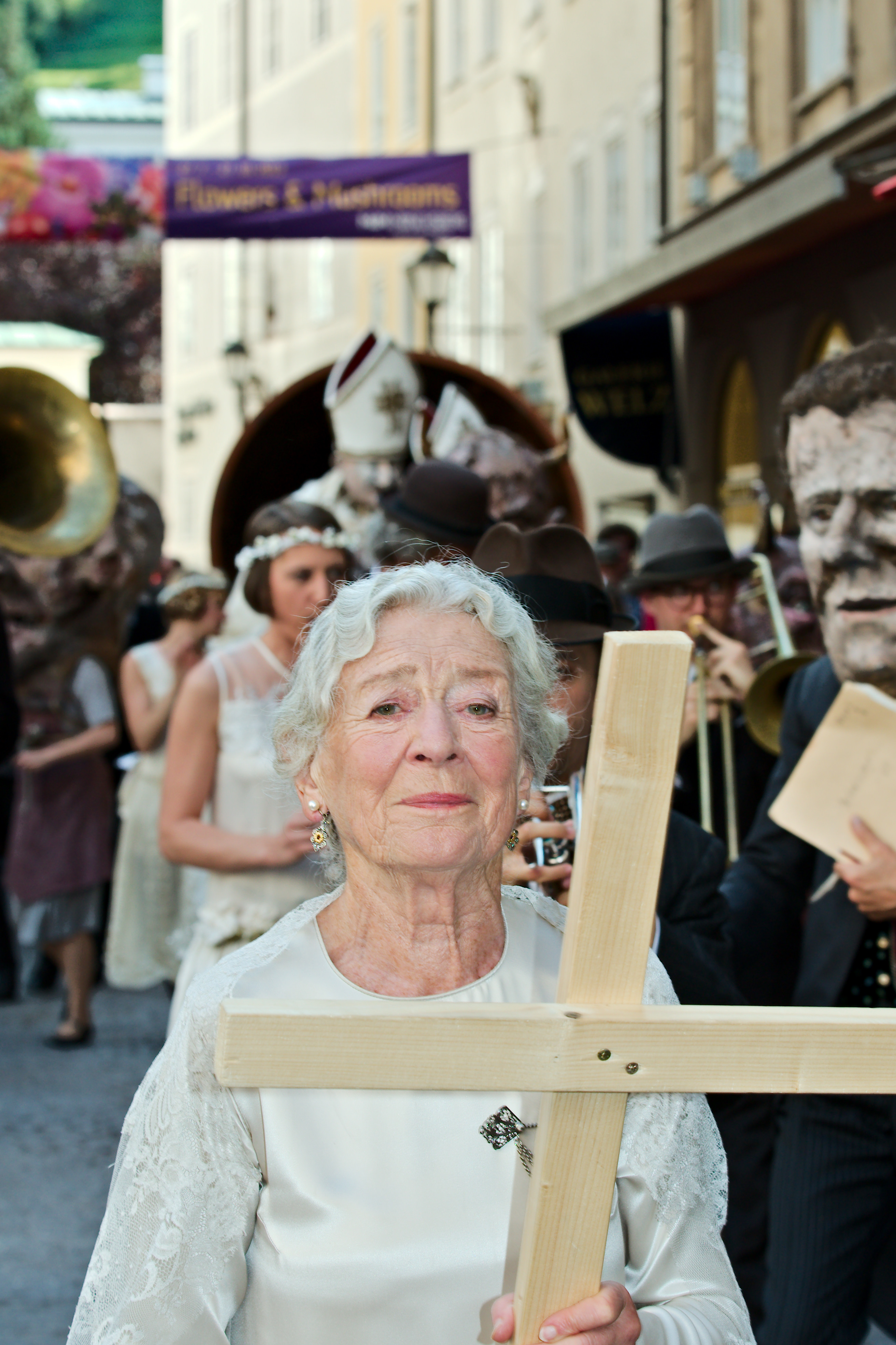 Zug des Jedermann Ensembles vom Festspielhaus zum Domplatz